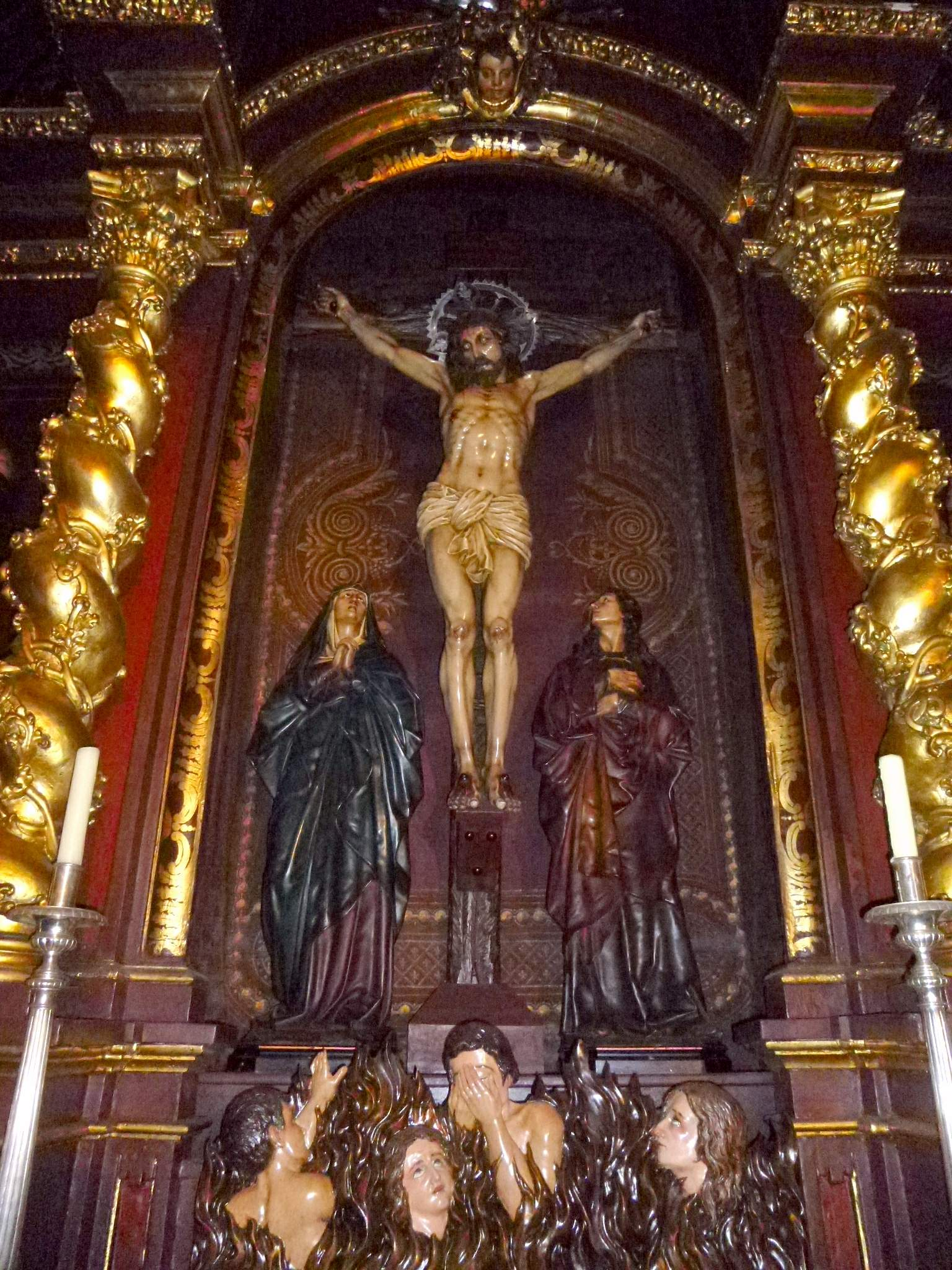 A Coruña - Iglesia de San Jorge